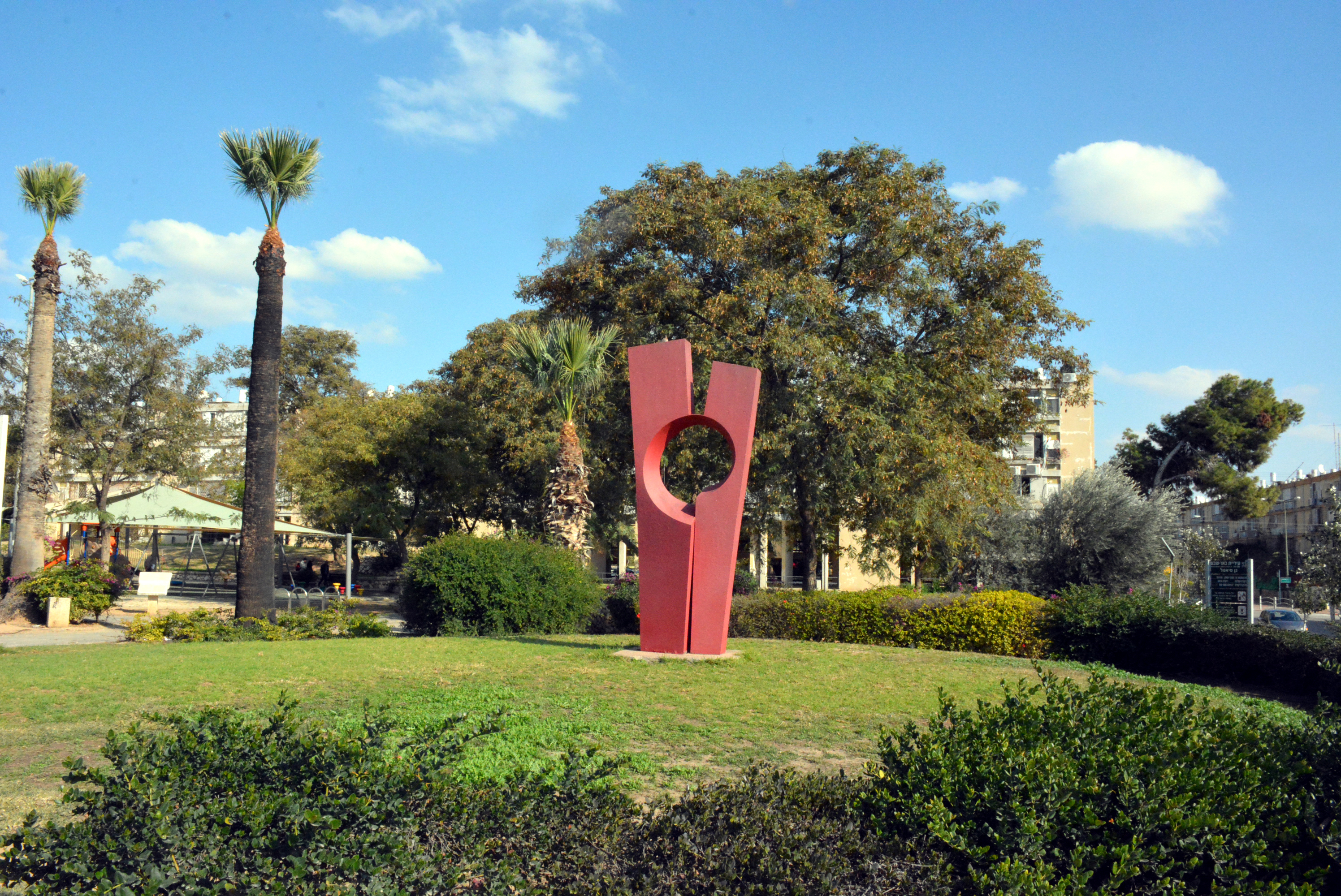 הפארק סיאטל בבאר שבע הנקרא גם "גן סיאטל" על שם העיר התאומה סיאטל